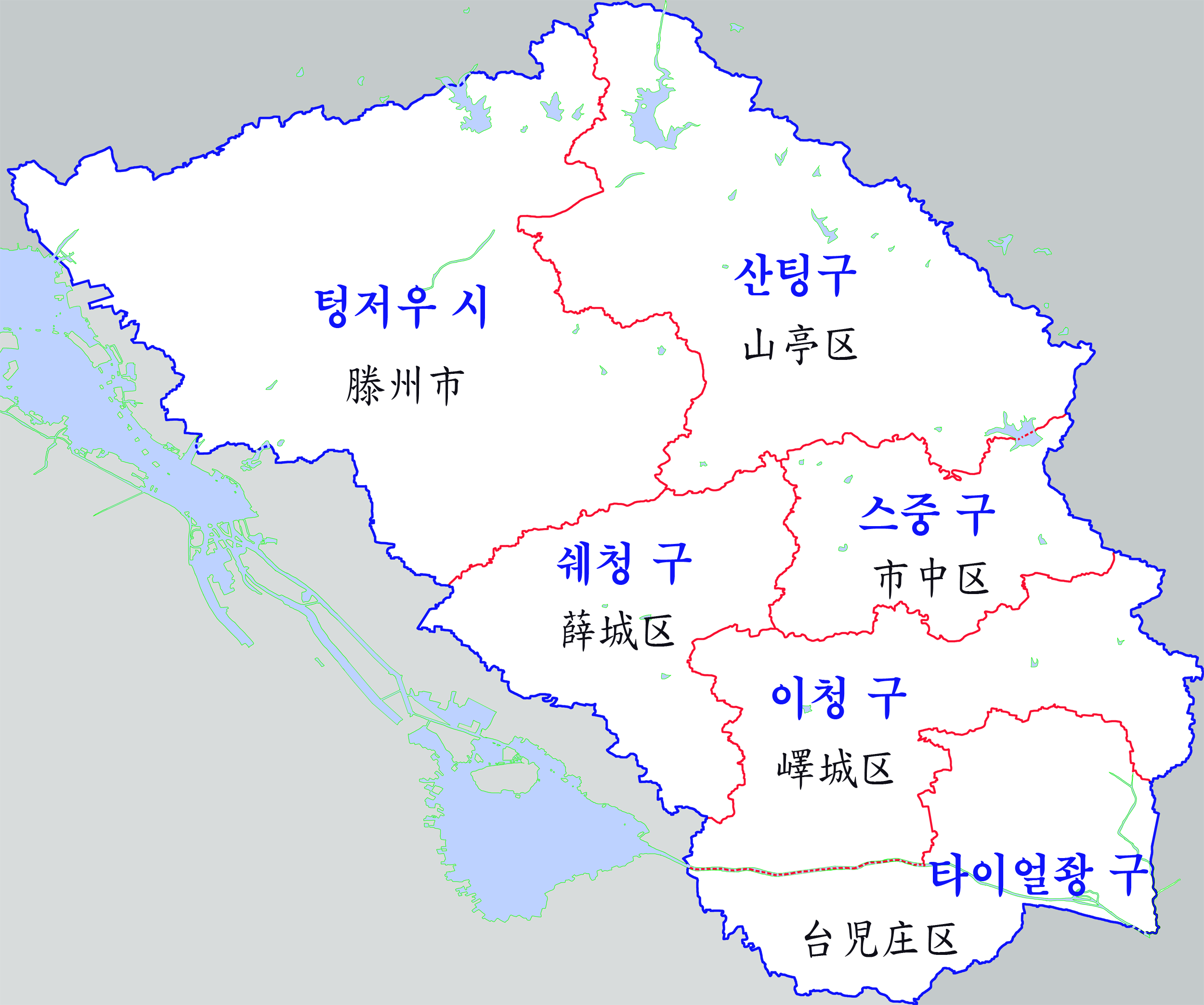 짜오좡시 행정구역